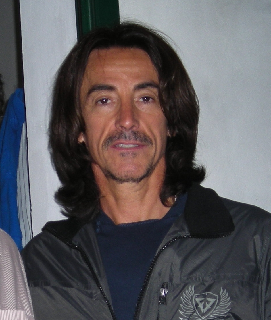 Alberto Fortis a San Bartolomeo al Mare